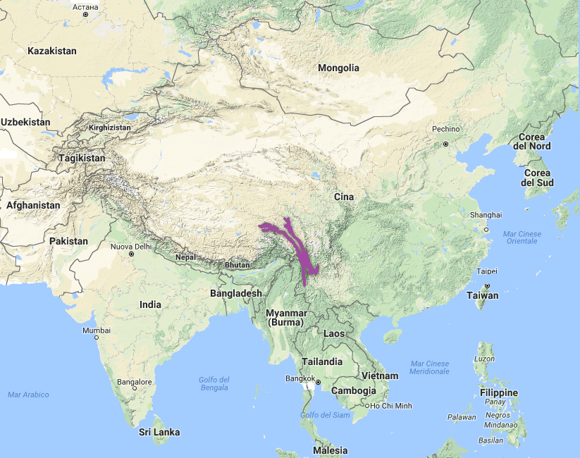 Ecoregione PA0516: Foreste di conifere e miste della gola di Nujiang Langcang